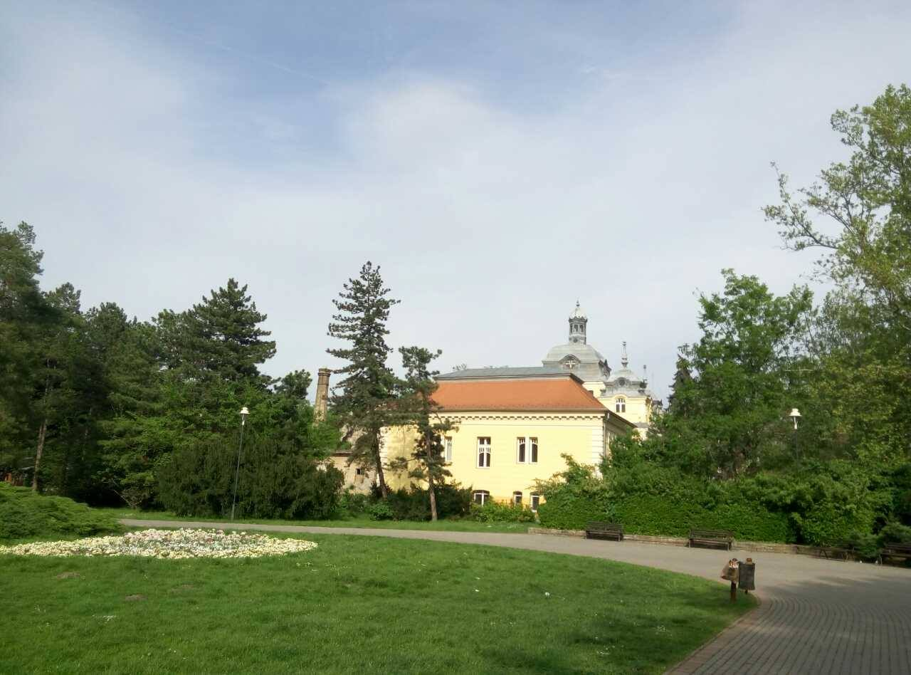 Српски (ћирилица): Футошки парк